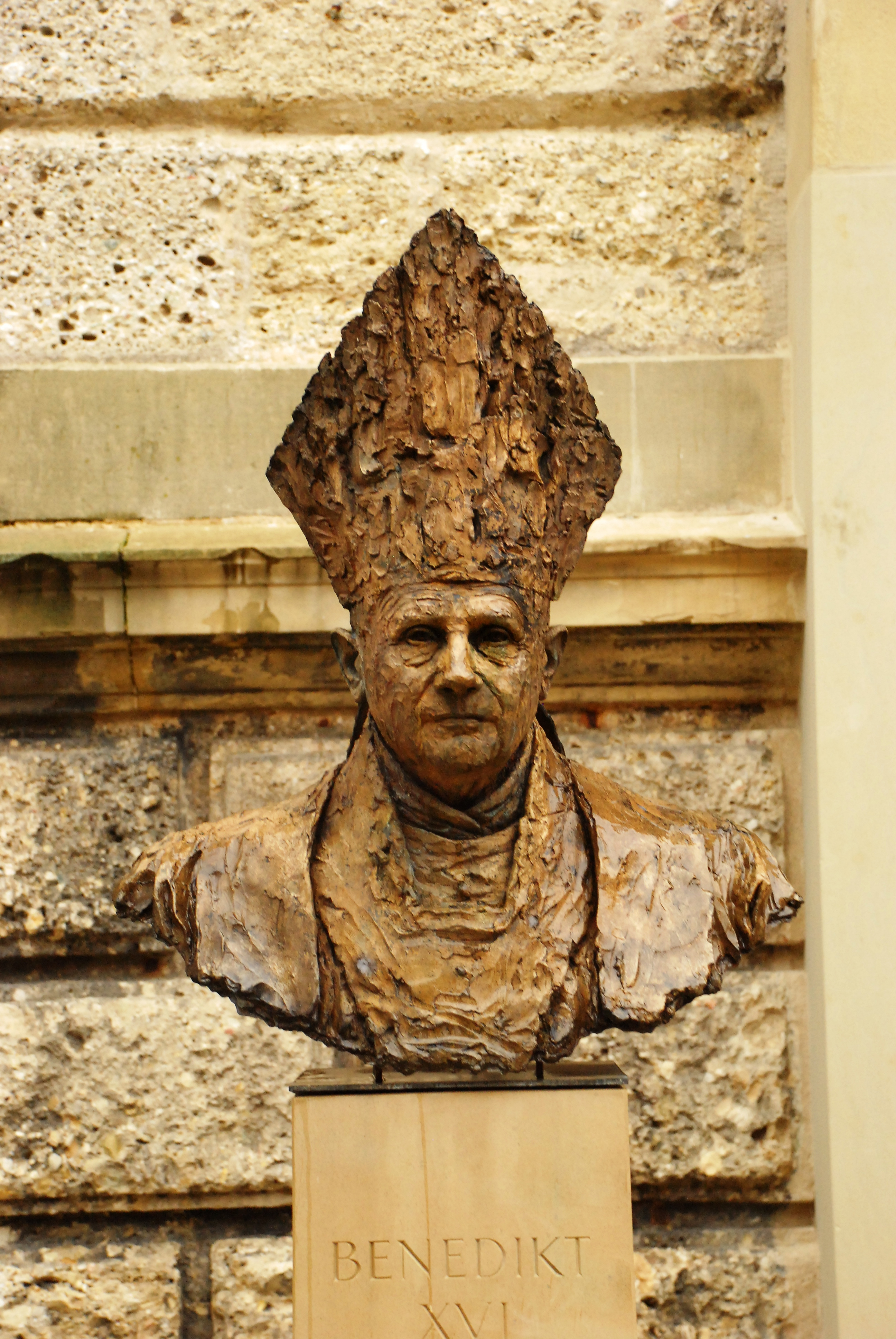 Bronzebüste Papst Benedikt XVI. des Bildhauers Johann Brunner vor der katholischen Kirche St. Oswald in der Kreisstadt Traunstein, Regierungsbezirk Oberbayern, Bayern. Errichtet im Jahr 2007 zur Erinnerung an den Primizgottesdienst Joseph Ratzingers in St. Oswald am 8. Juli 1951. Foto gemäß den Voraussetzungen zur Panoramafreiheit von öffentlicher Verkehrsfläche aus aufgenommen.